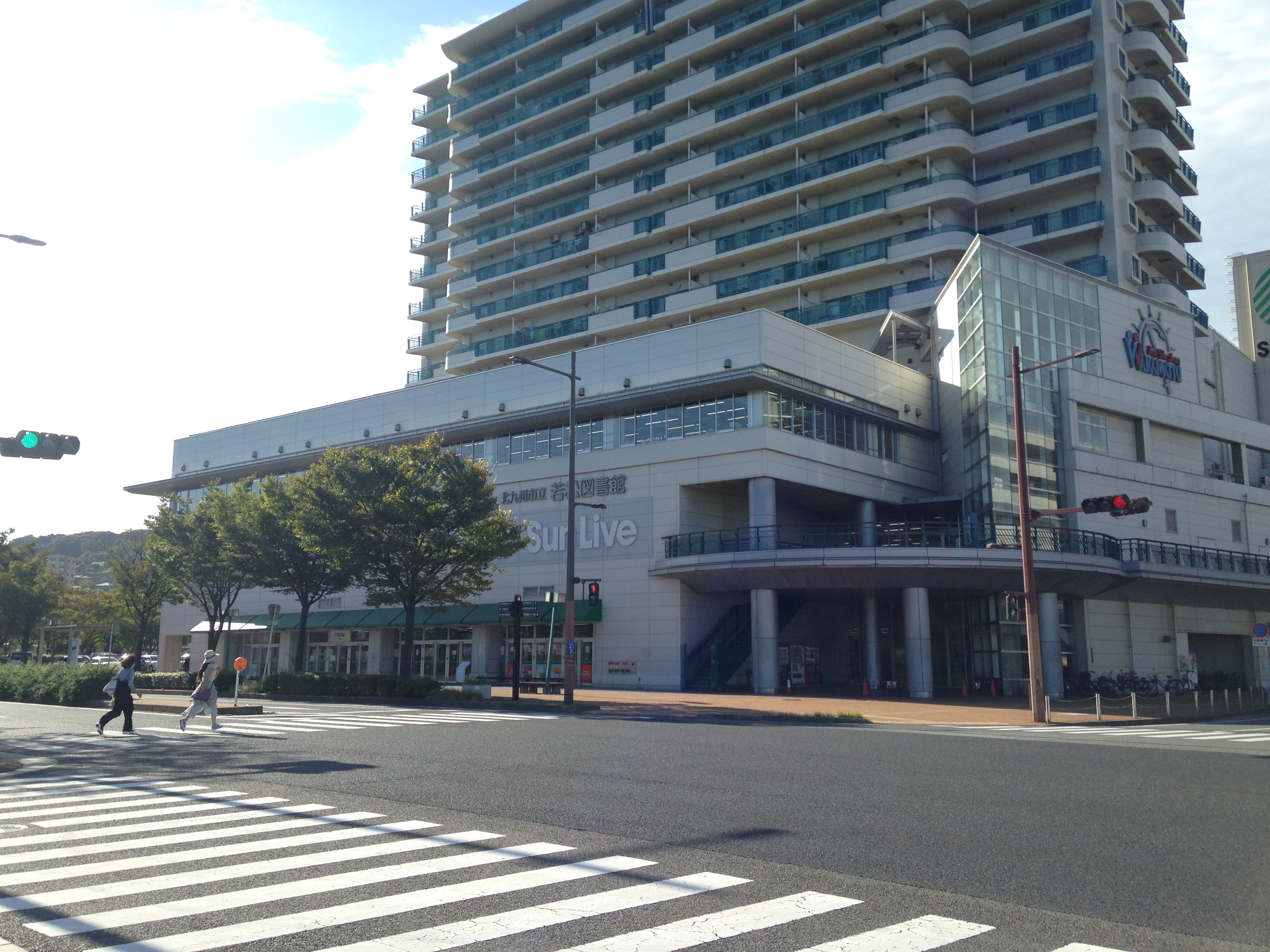 北九州市立若松図書館(ベイサイドプラザ)